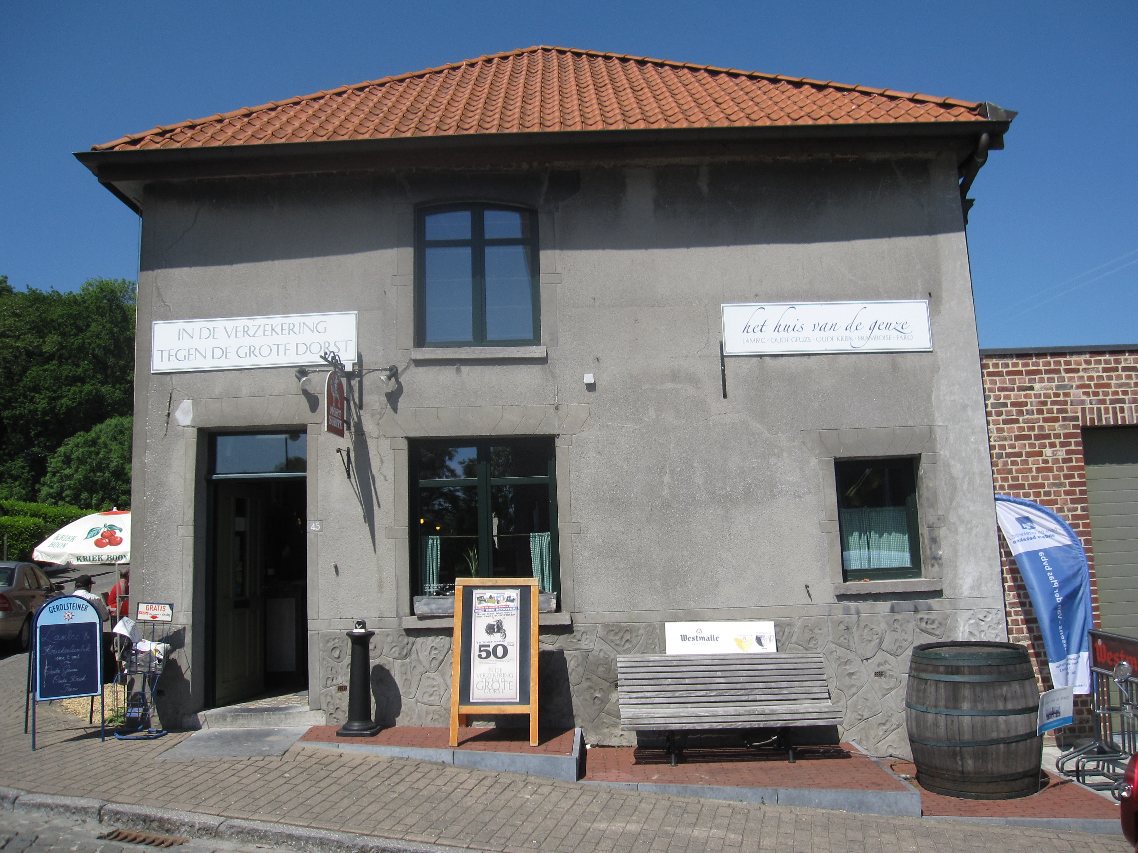 Gevel van In de Verzekering tegen de grote dorst in Eizeringen, genomen op zondag 27 mei 2012 door Bernt Rostad.